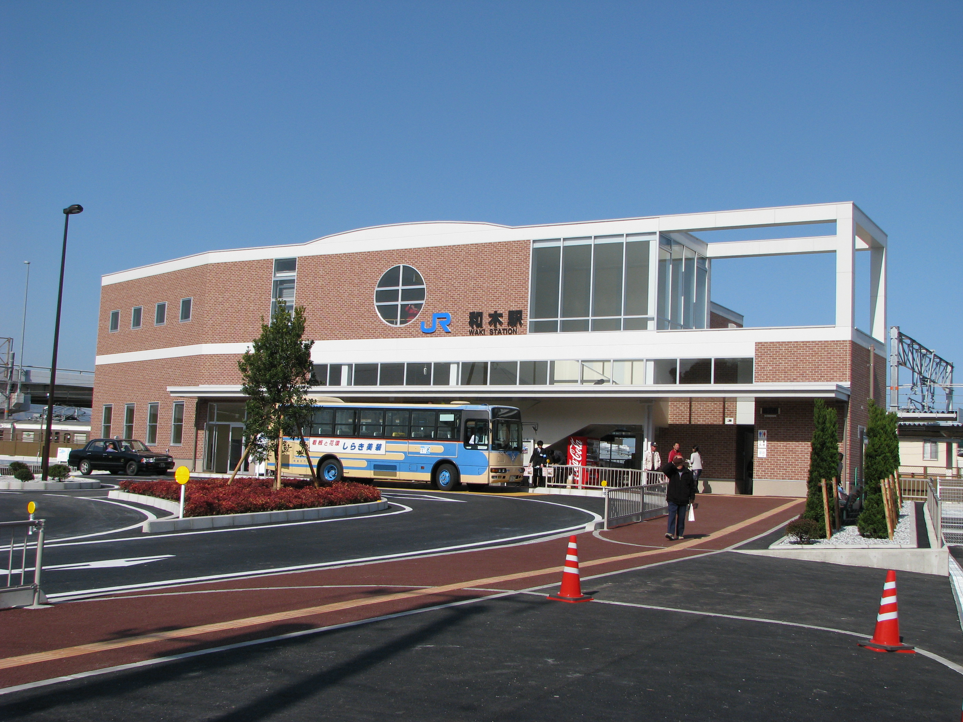 和木駅西口